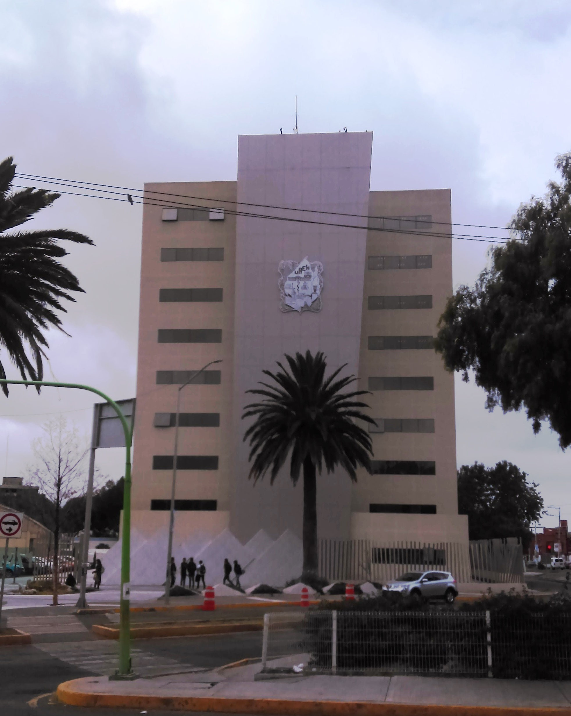 Prepa 1 de la UAEH en Pachuca, México